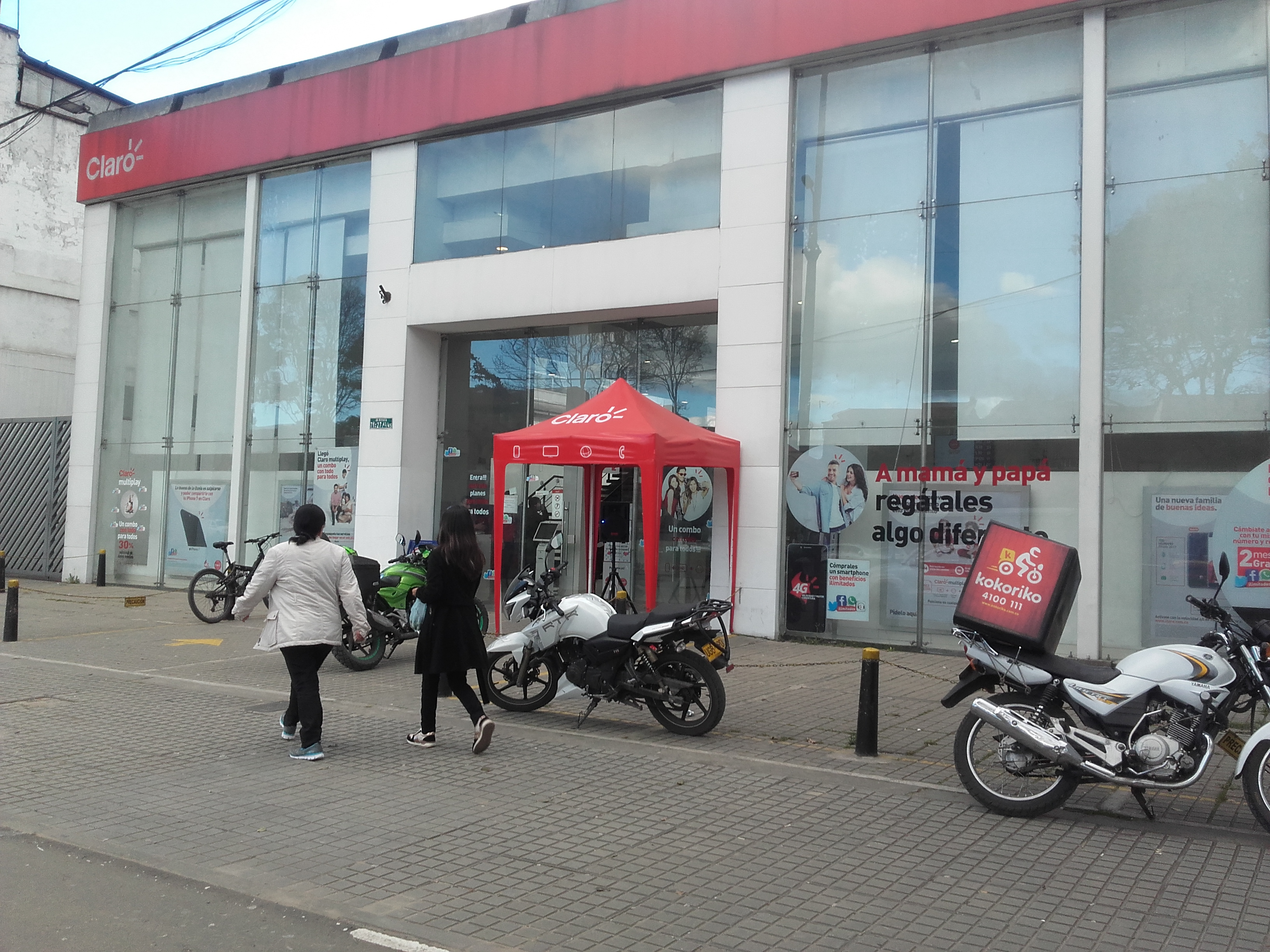 dmmememdmemfmfm